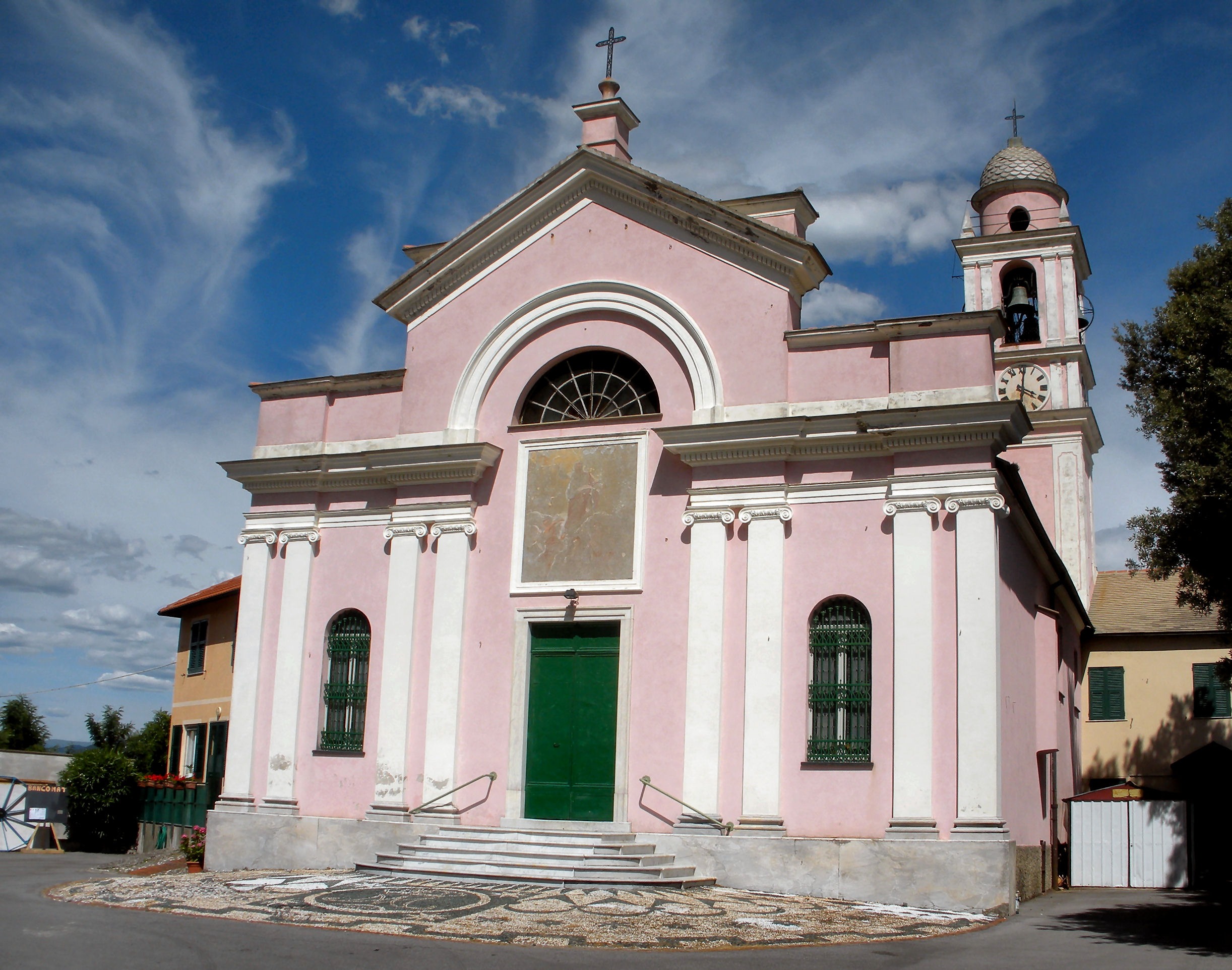 Chiesa S. Bartolomeo di Livellato (Ceranesi - Genova) Foto propria Giugno 2009